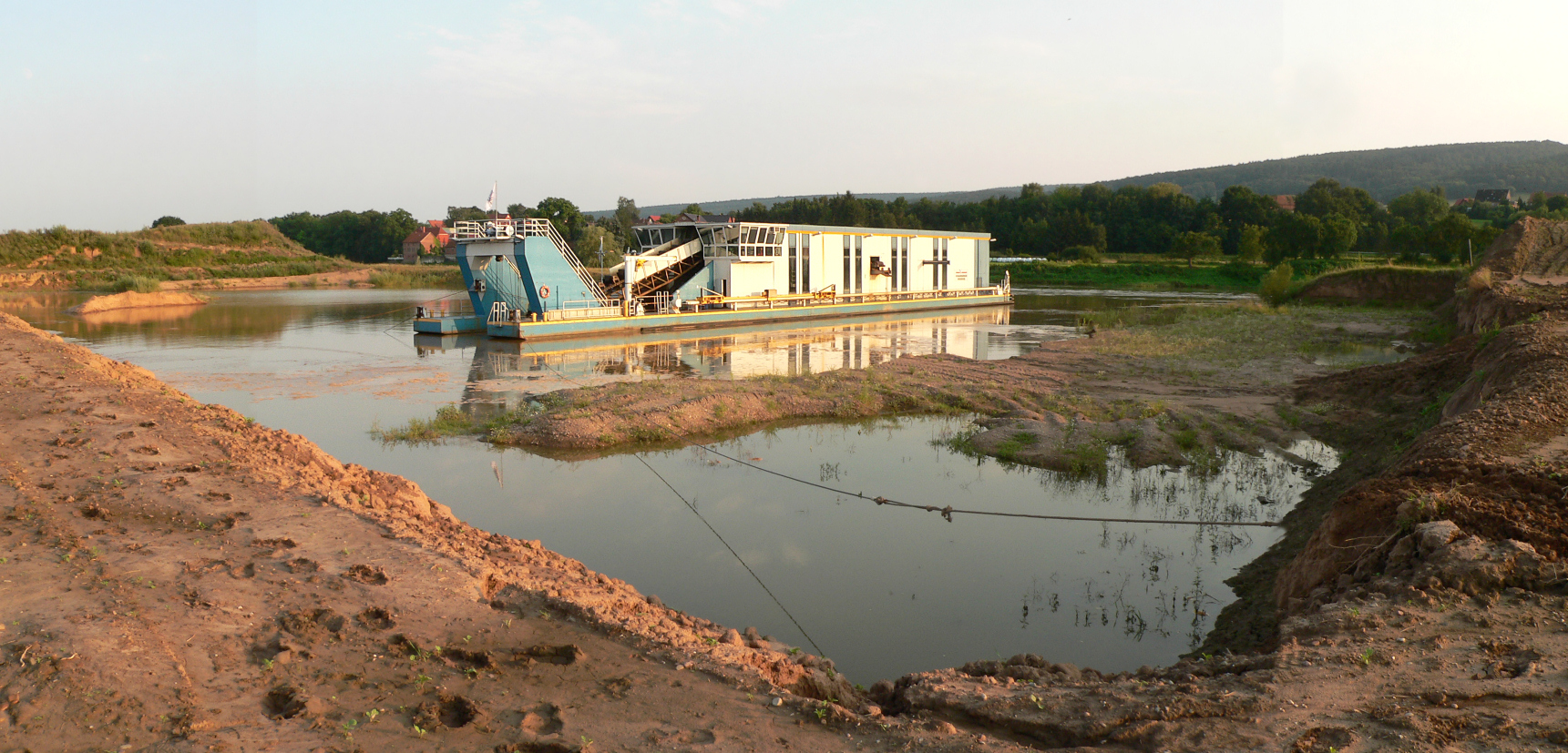 Kiesbagger bei Großenwieden